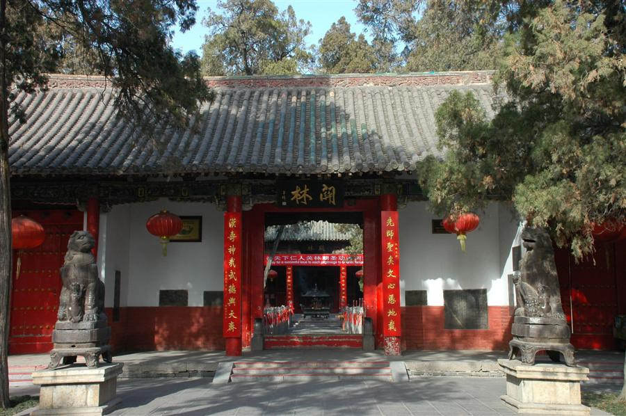 河南洛阳关林